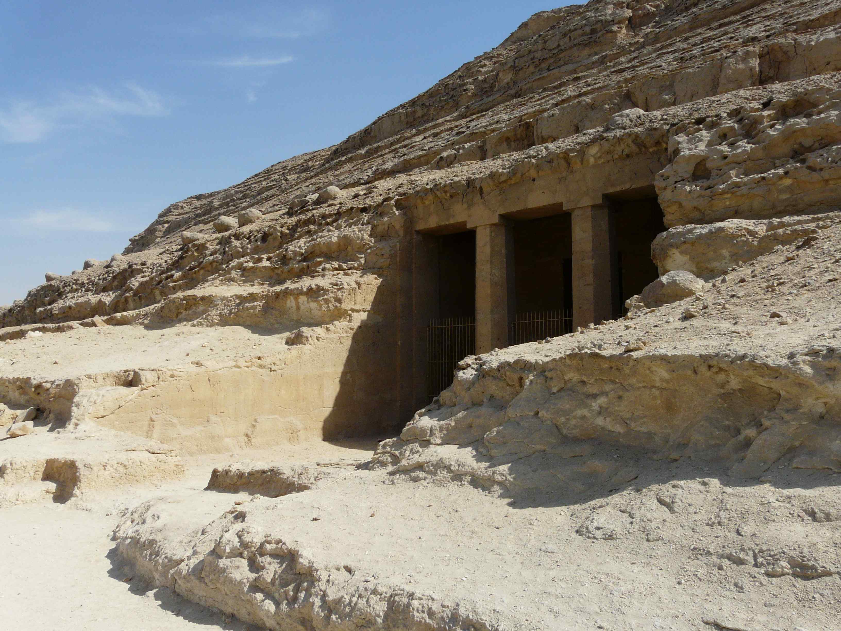 Beni Hassan - Entrée de la tombe de Khnoumhotep II